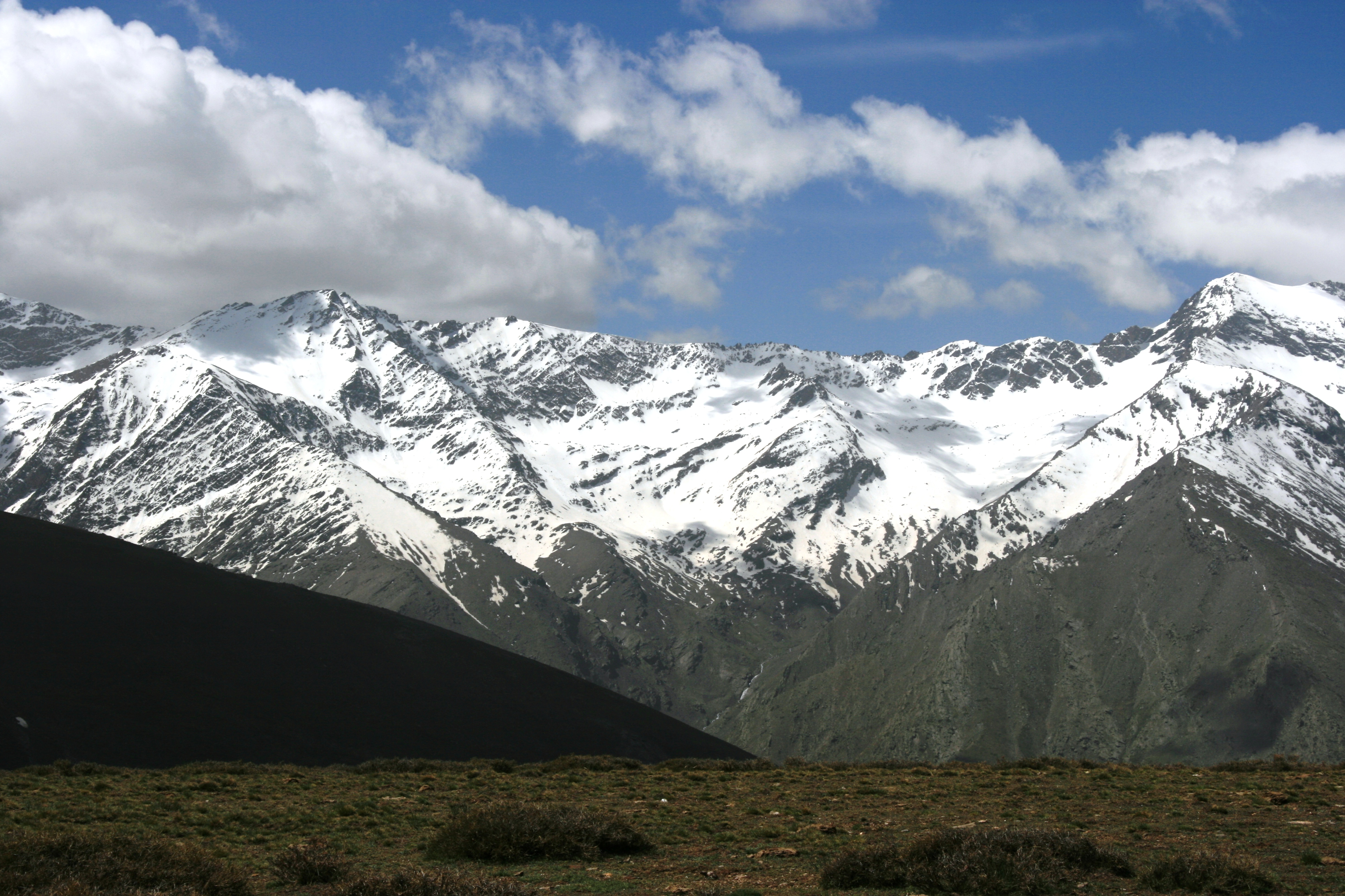 Cuenca Superior del río Valdeinfierno, en Sierra Nevada (España).